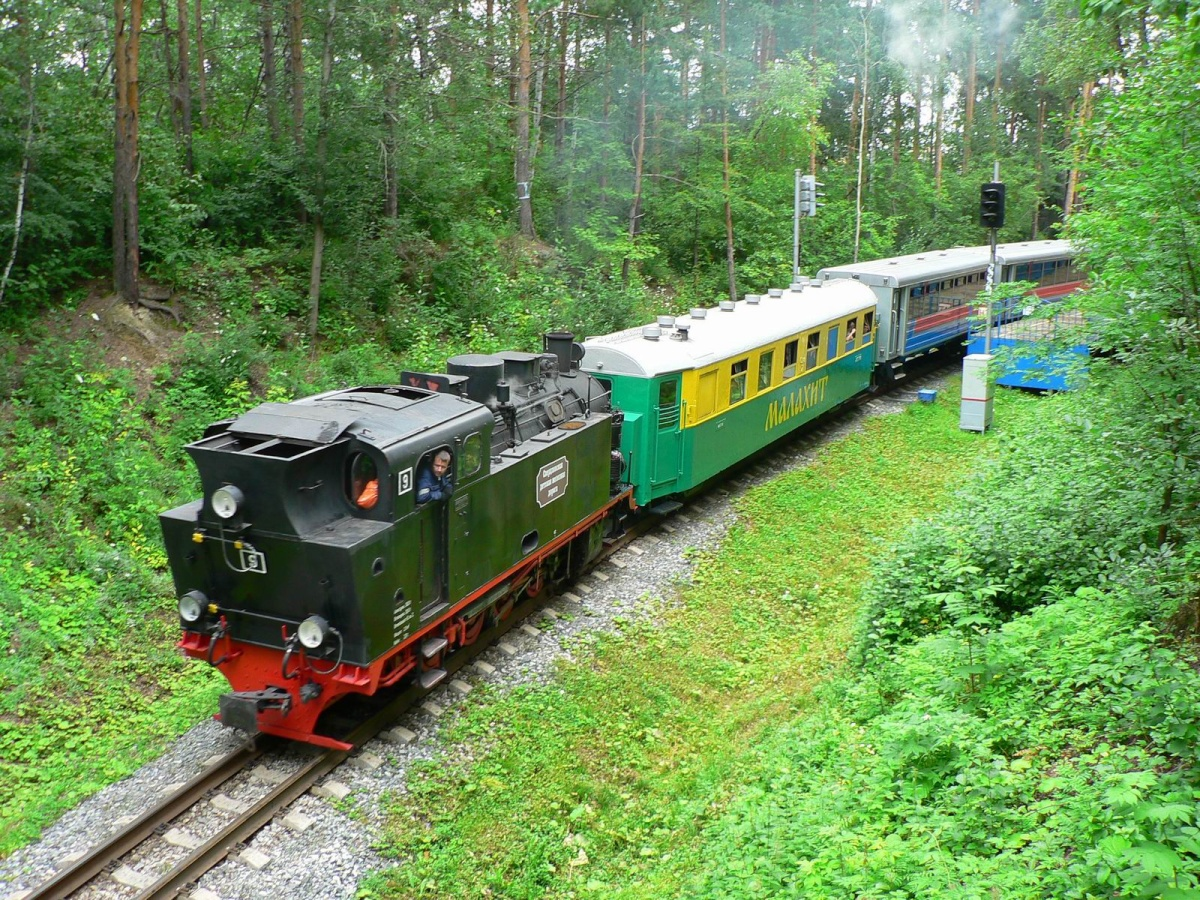 Паровоз O&K №12350 (№9) с пассажирским поездом на участке Солнечная - Центральная